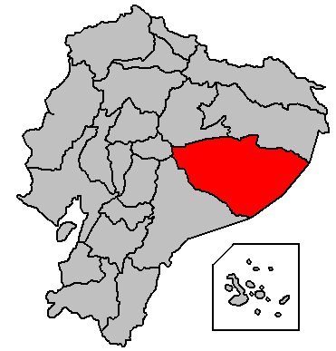 Ubicación en la República del Ecuador.